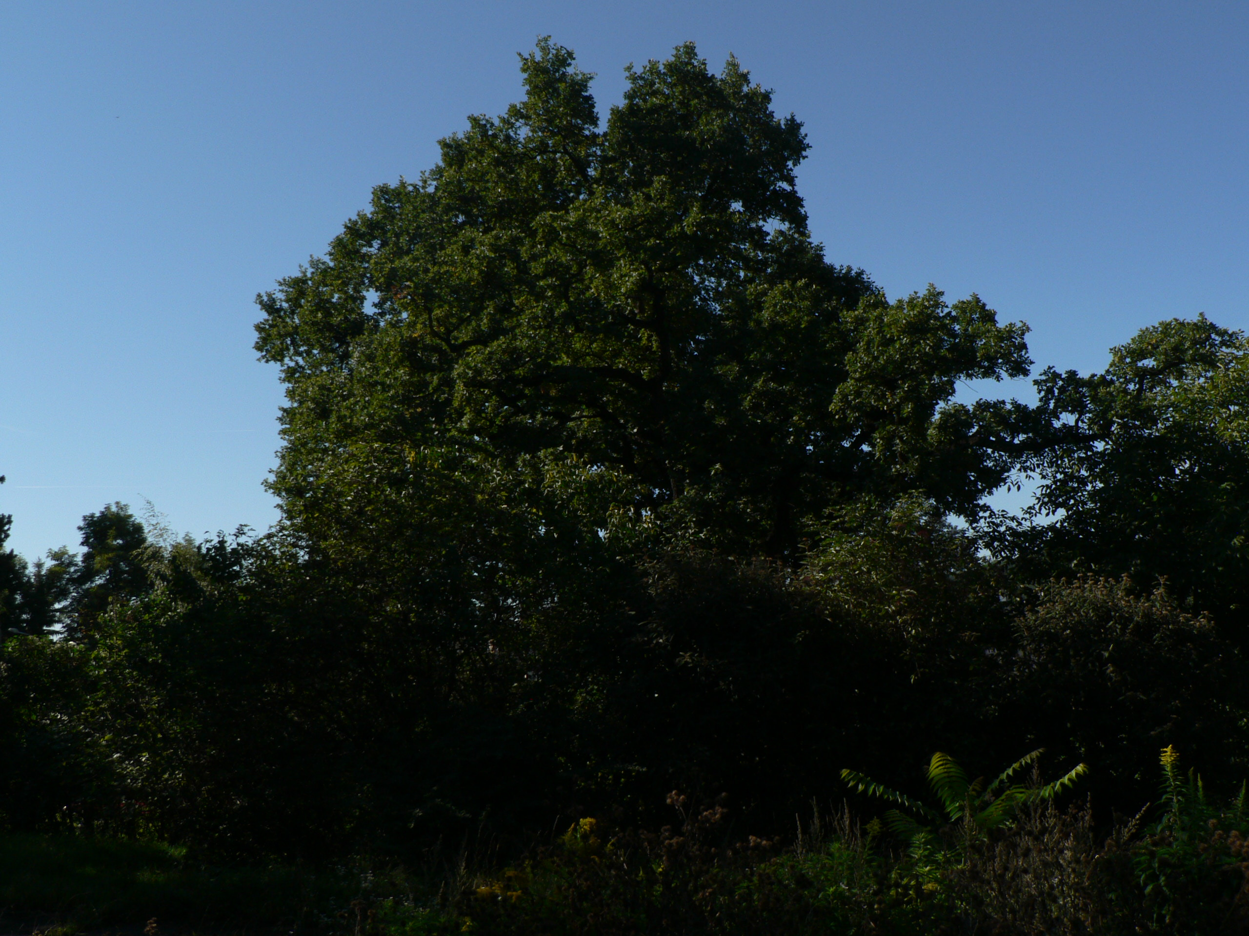 Památný strom (dub letní) v ul. Mezivrší, Praha - Braník